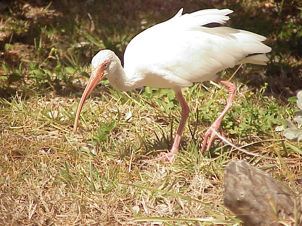 Ibis blanc (Eudocimus albus) en Floride. Photo personnelle.